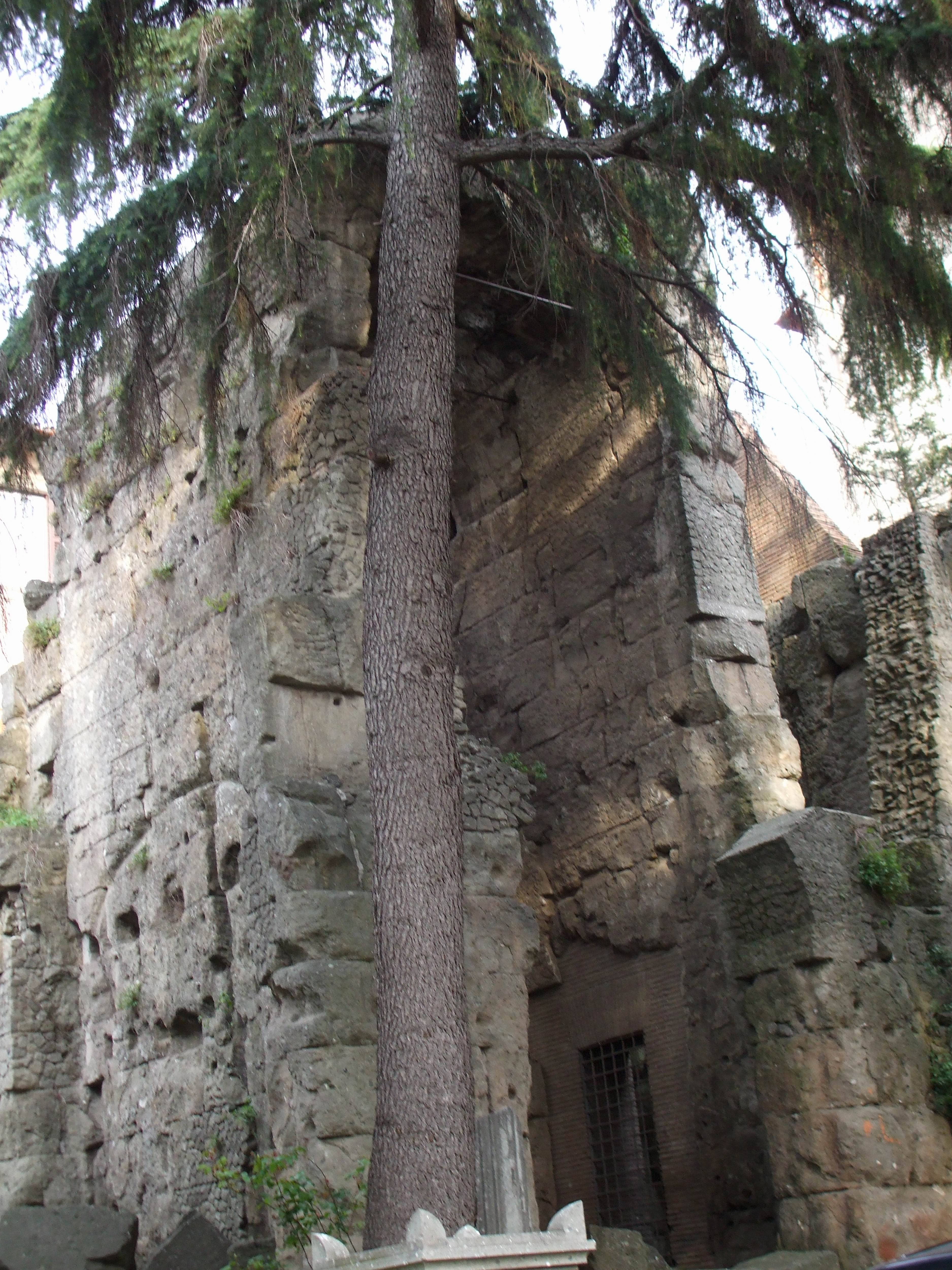 Albano Laziale - la Porta Pretoria da Palazzo Savelli